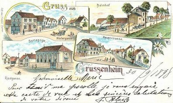 Ansichtskarte von Grussenheim im Elsass